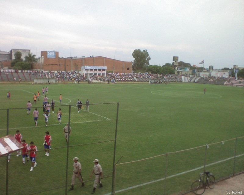 Estadio del Club Sportivo San Lorenzo